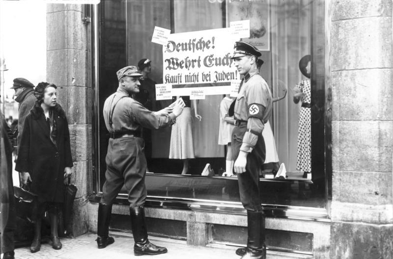 An den Fenstern jüdischer Geschäfte werden von Nationalsozialisten Plakate mit der Aufforderung "Deutsche, wehrt euch, kauft nicht bei Juden" angebracht.